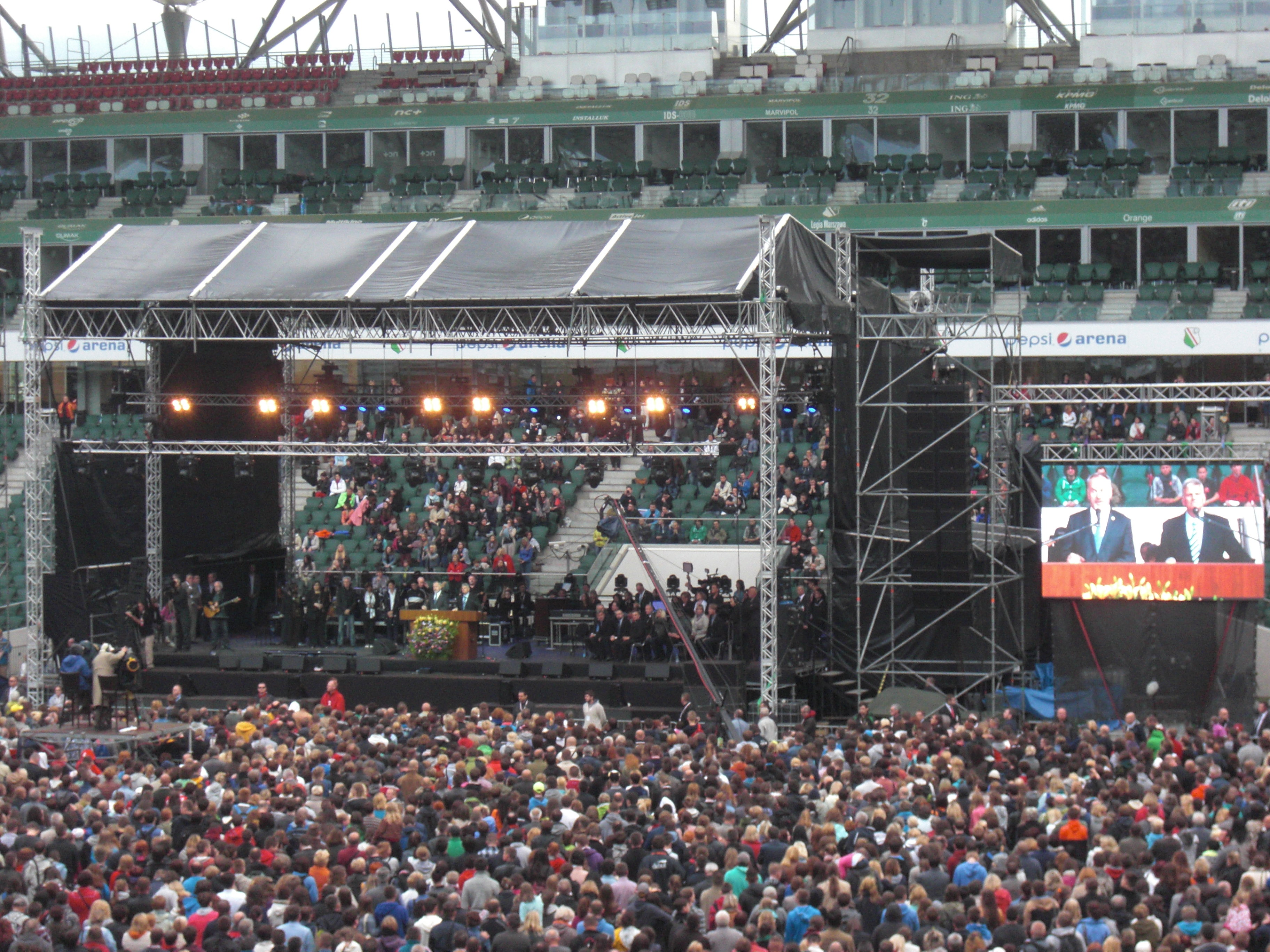 Festiwal Nadziei Warszawa